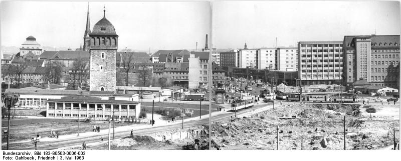 Chemnitz, Straße der Nationen, "Roter Turm" Zentralbild Gahlbeck Sta-Pr 3.5.1963 10 Jahre Karl-Marx-Stadt Am 10. Mai 1963 feiern die Einwohner von Karl-Marx-Stadt den 10. Jahrestag der Umbenennung ihrer Stadt. Viel hat sich in den letzten Jahren in der im zweiten Weltkrieg schwer zerstörten Stadt verändert. Sie ist jünger und schöner geworden. UBz: Zur künftigen Magistrale der Bezirksstadt wird die "Straße der Nationen" ausgebaut. Links das Wahrzeichen von Karl-Marx-Stadt, der Rote Turm. Auch die alten Gebäude links im Hintergrund werden bald neuen schönen Häusern weichen müssen.